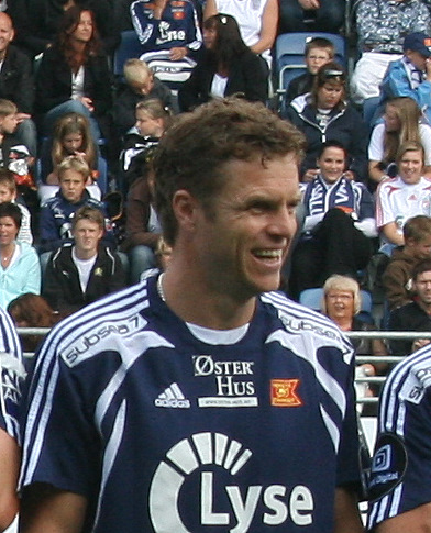 Trond Egil Soltvedt